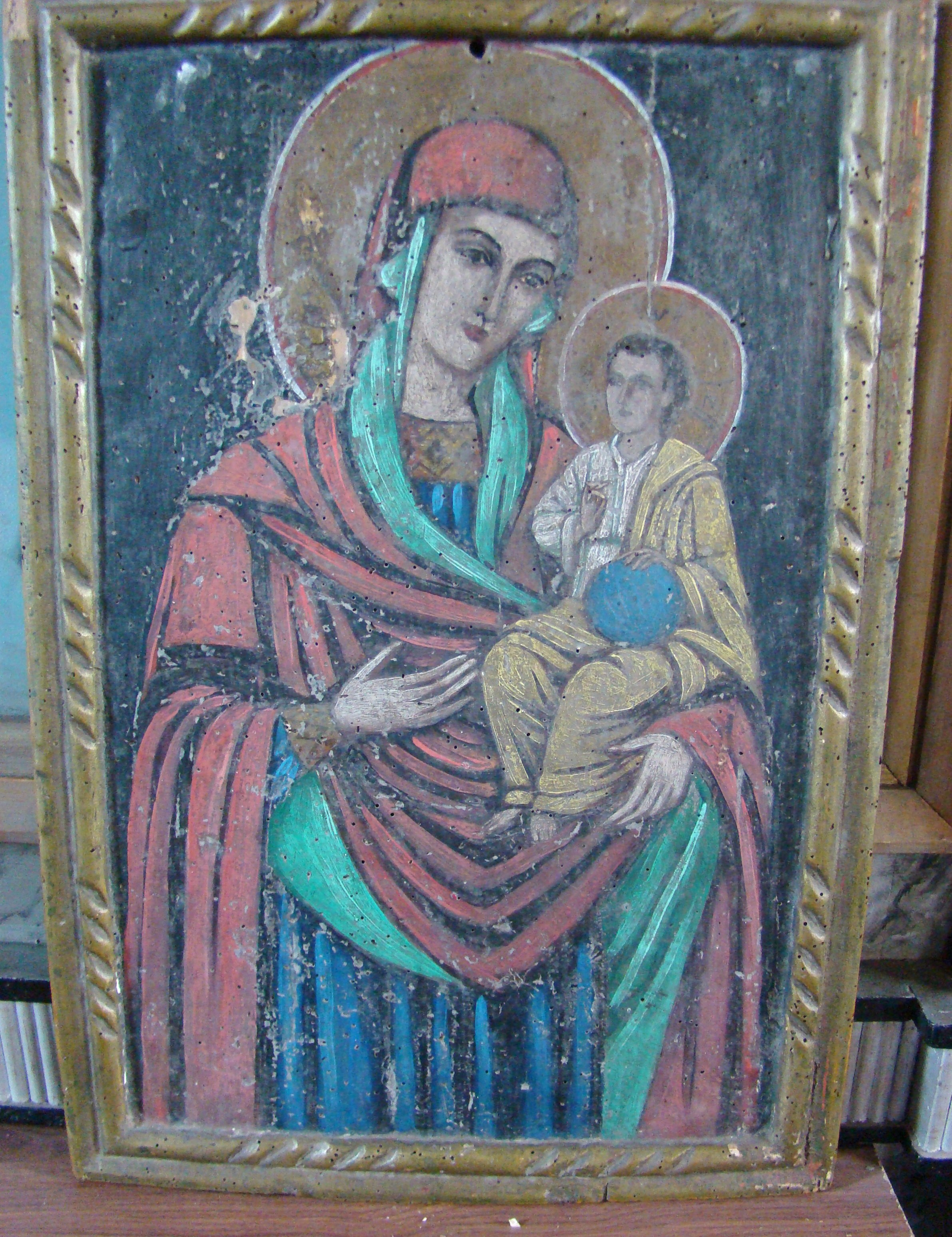 Biserica „Sfântul Ierarh Nicolae”, sat OBÂRŞA; comuna TOMEŞTI